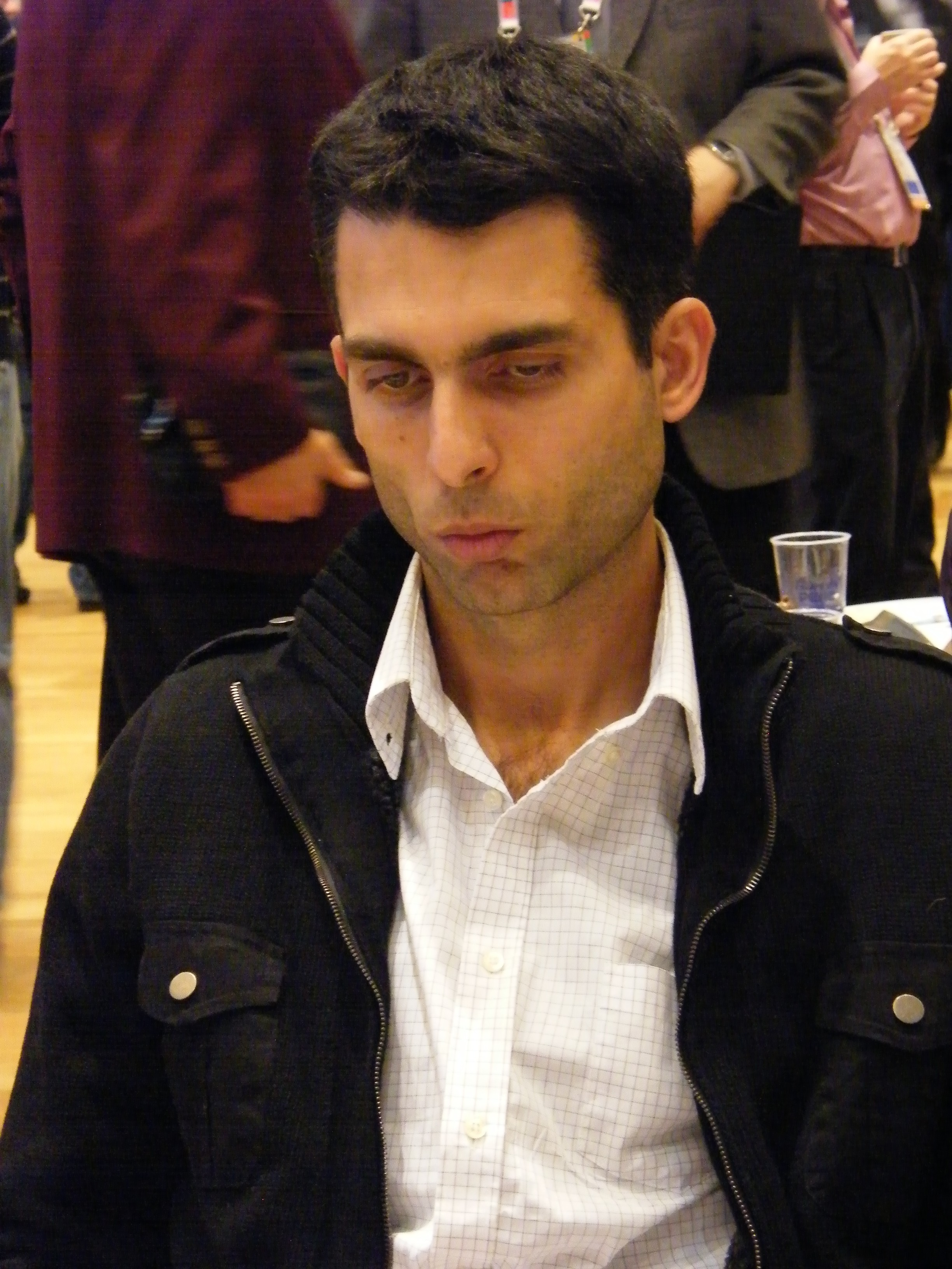 Alexander Deltschew bei der 38. Schacholympiade in Dresden 2008